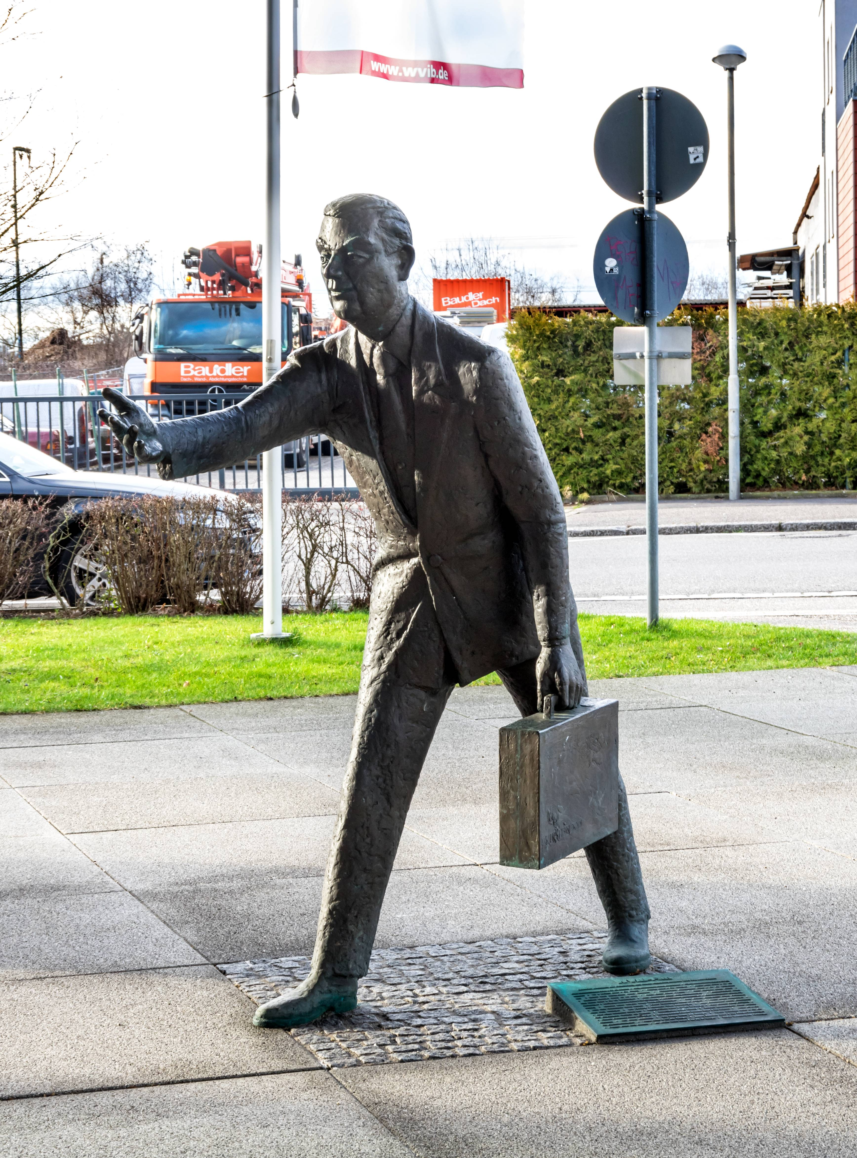 Bilder aus Freiburg im Breisgau, die Oltmanstraße